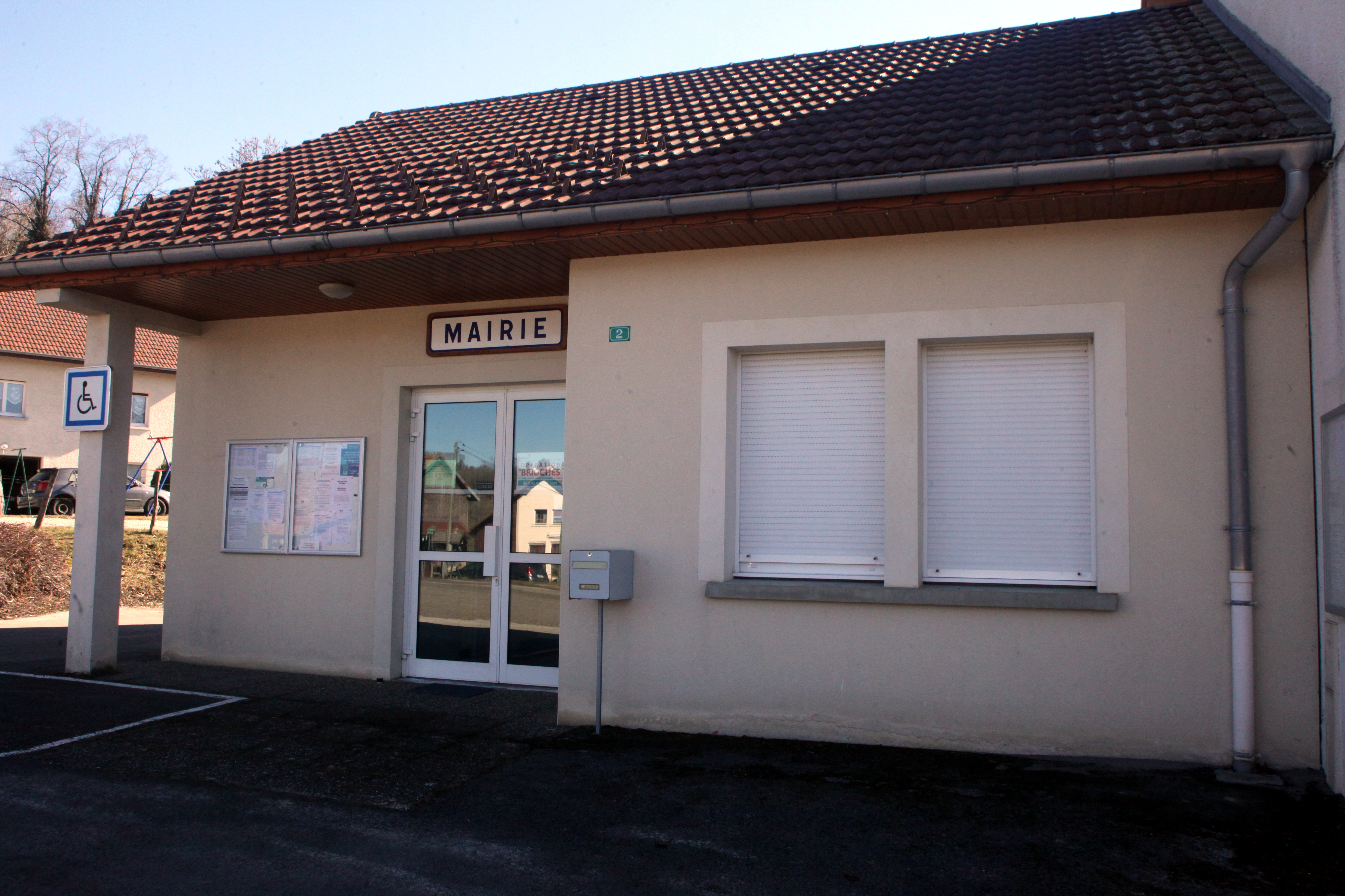 Mairie de Mancenans-Lizerne.